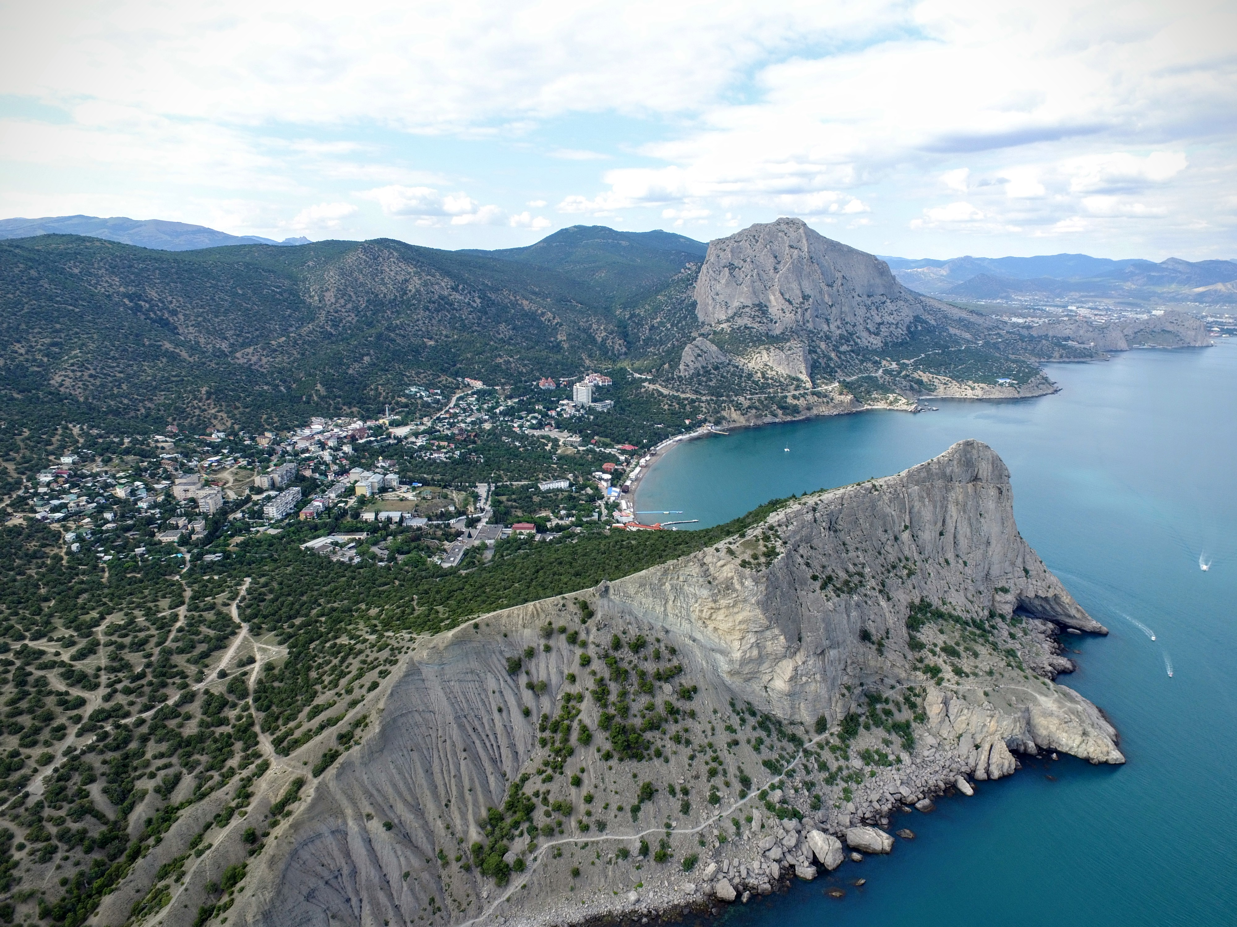 Вид на посёлок Новый Свет, Синюю и Зелёную бухты и горы Коба-Кая и Сокол Город Судак на заднем плане